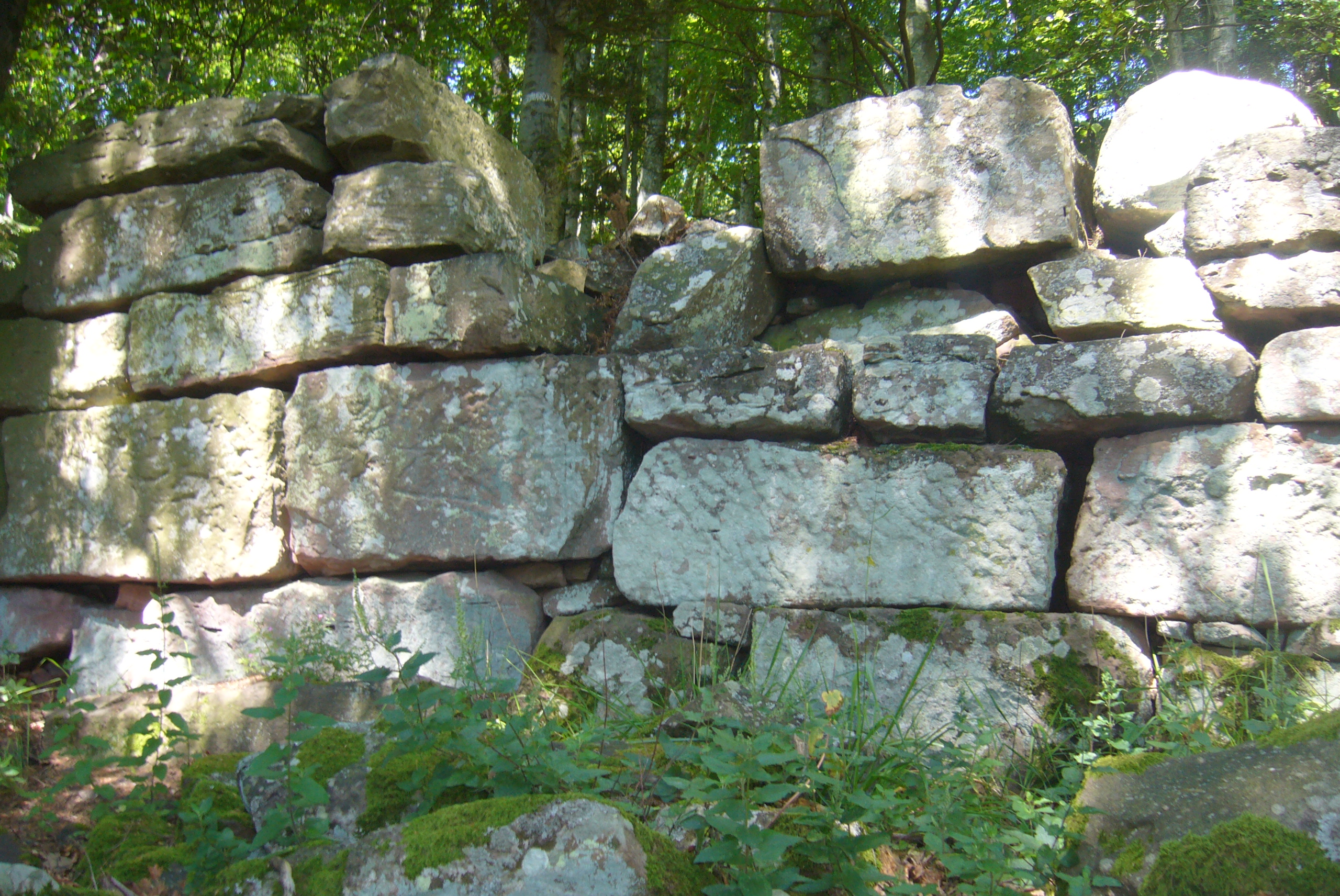 Frankenbourg_007.jpg